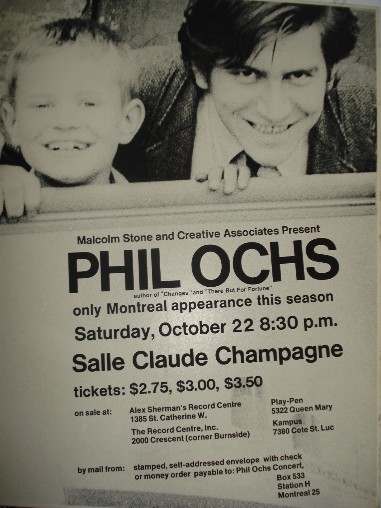 Affiche créé spécifiquement pour le concert à la Salle Claude Champagne de l'école de musique Vincent d'Indy aujourd'hui appartenant à la Faculté de musique de l'Université de Montréal